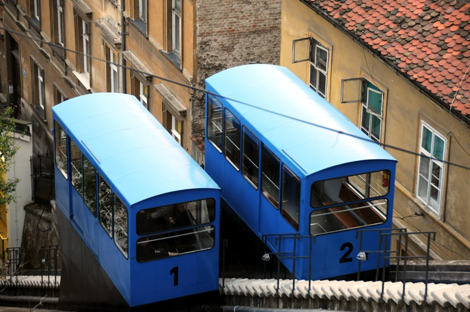 Funicular, Zagreb